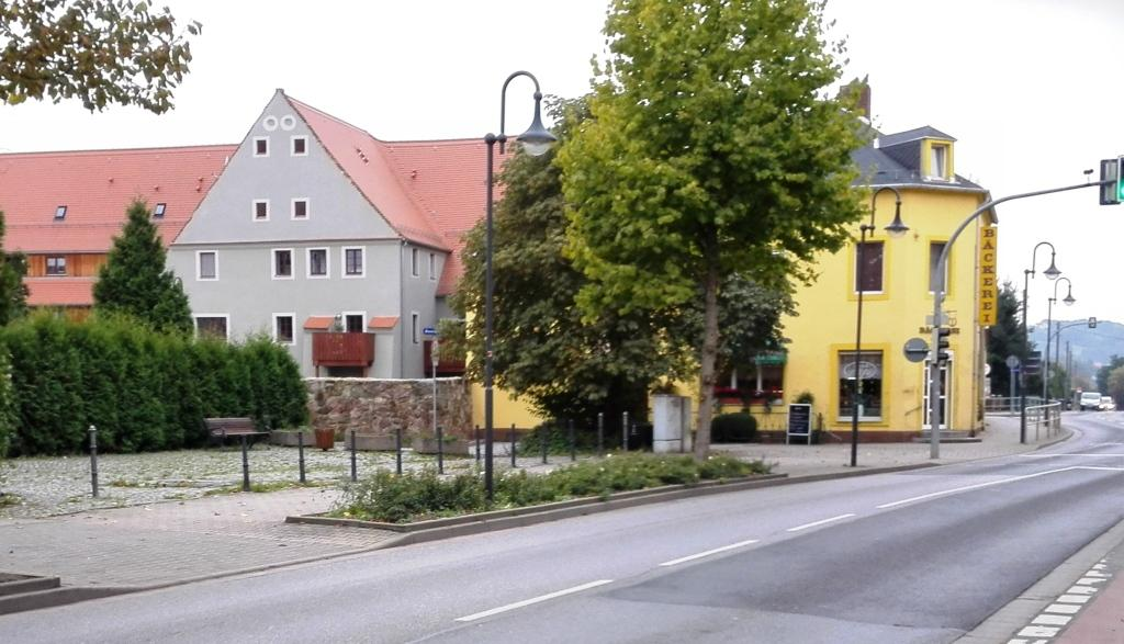 Cossebaude, Dresdner Straße. Kuppelendpunkt der Vorortbahn 2016